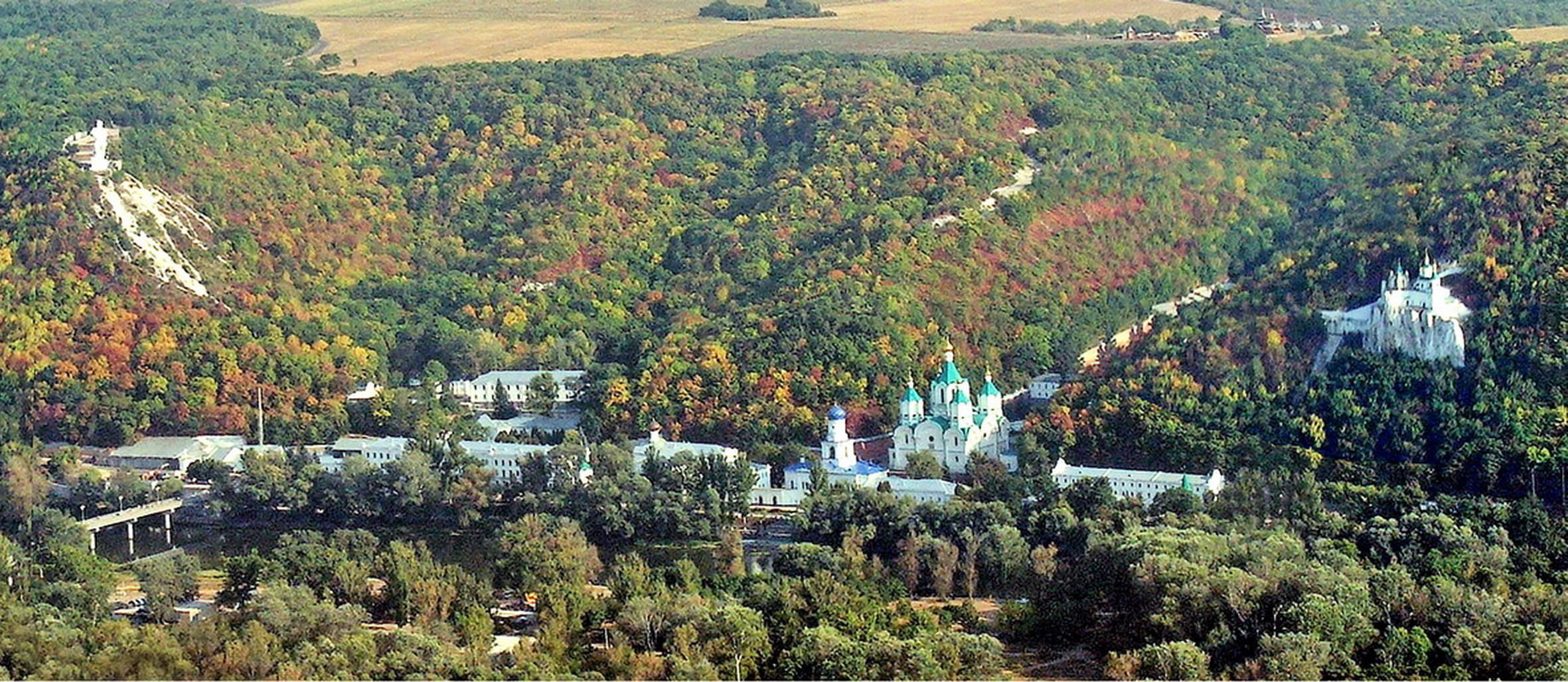 Вид с самолета на Заповедник с северной стороны.